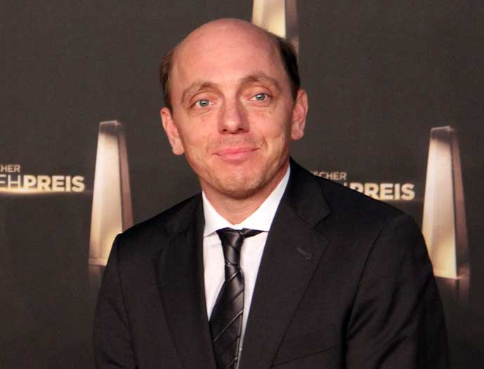 Bernhard Hoecker beim Deutschen Fernsehpreis 2012